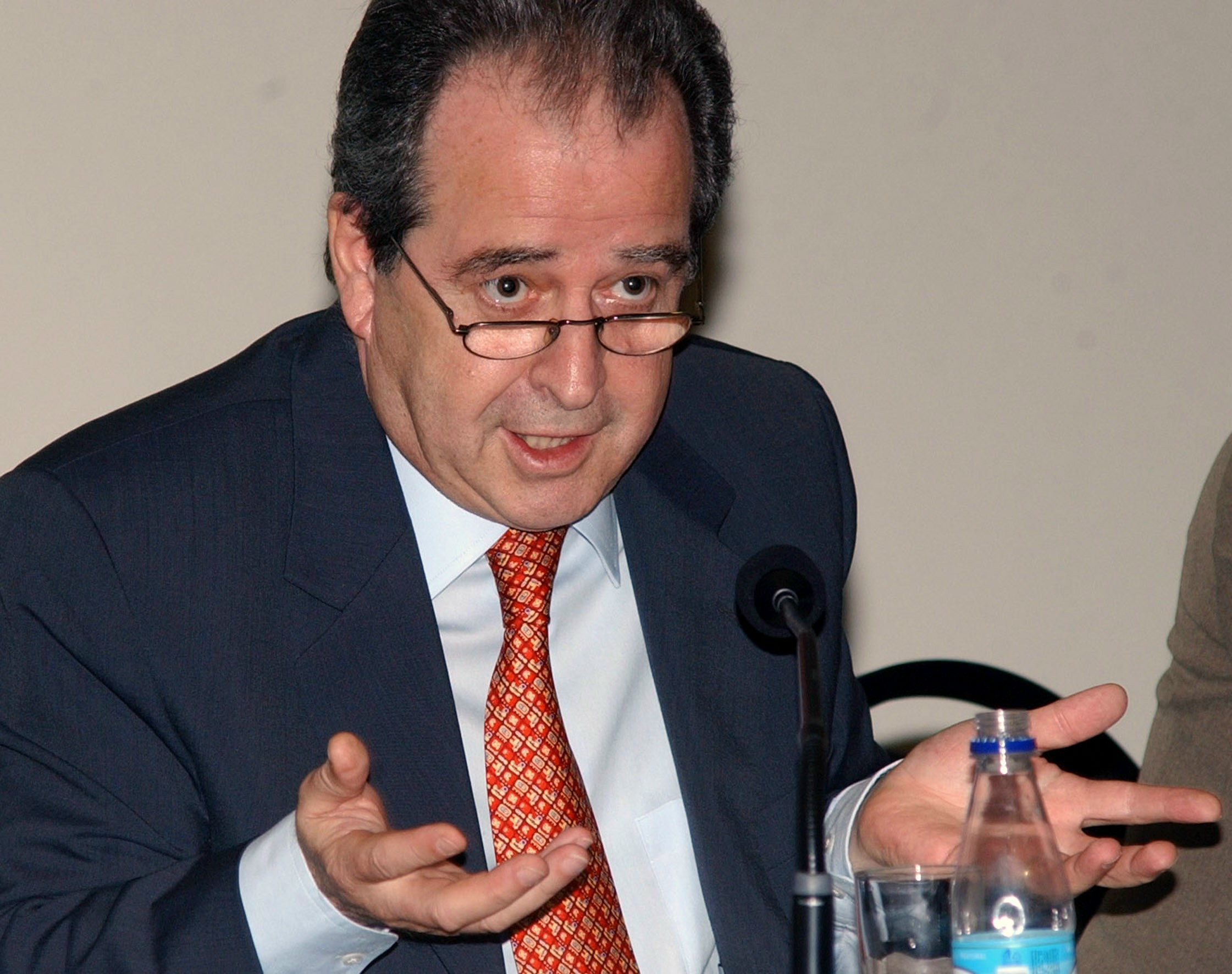 Brasília - O secretário-executivo da Comissão Econômica para América Latina e Caribe (Cepal), José Luis Machinea